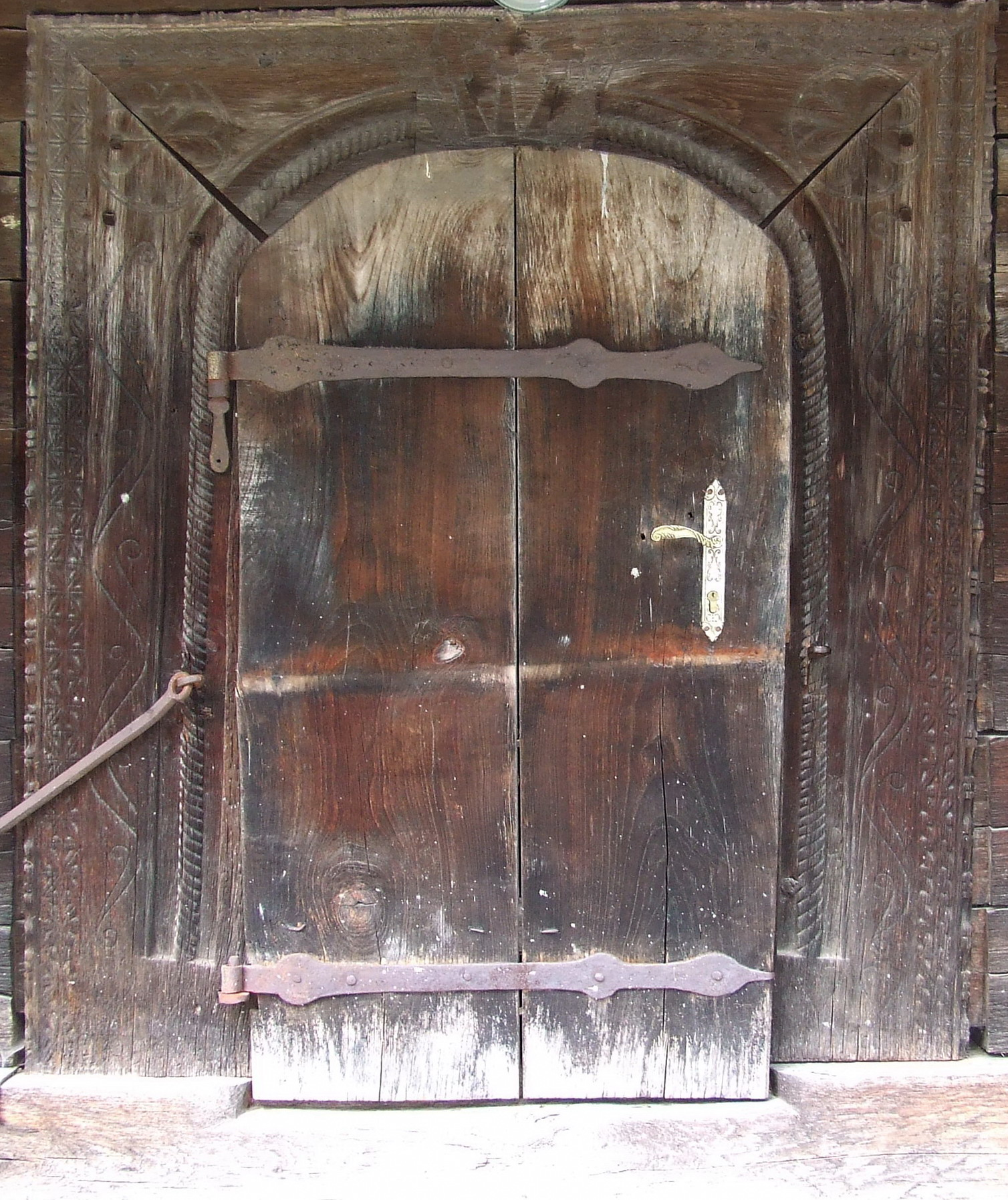 Biserica de lemn din Mierag, judeţul Bihor.